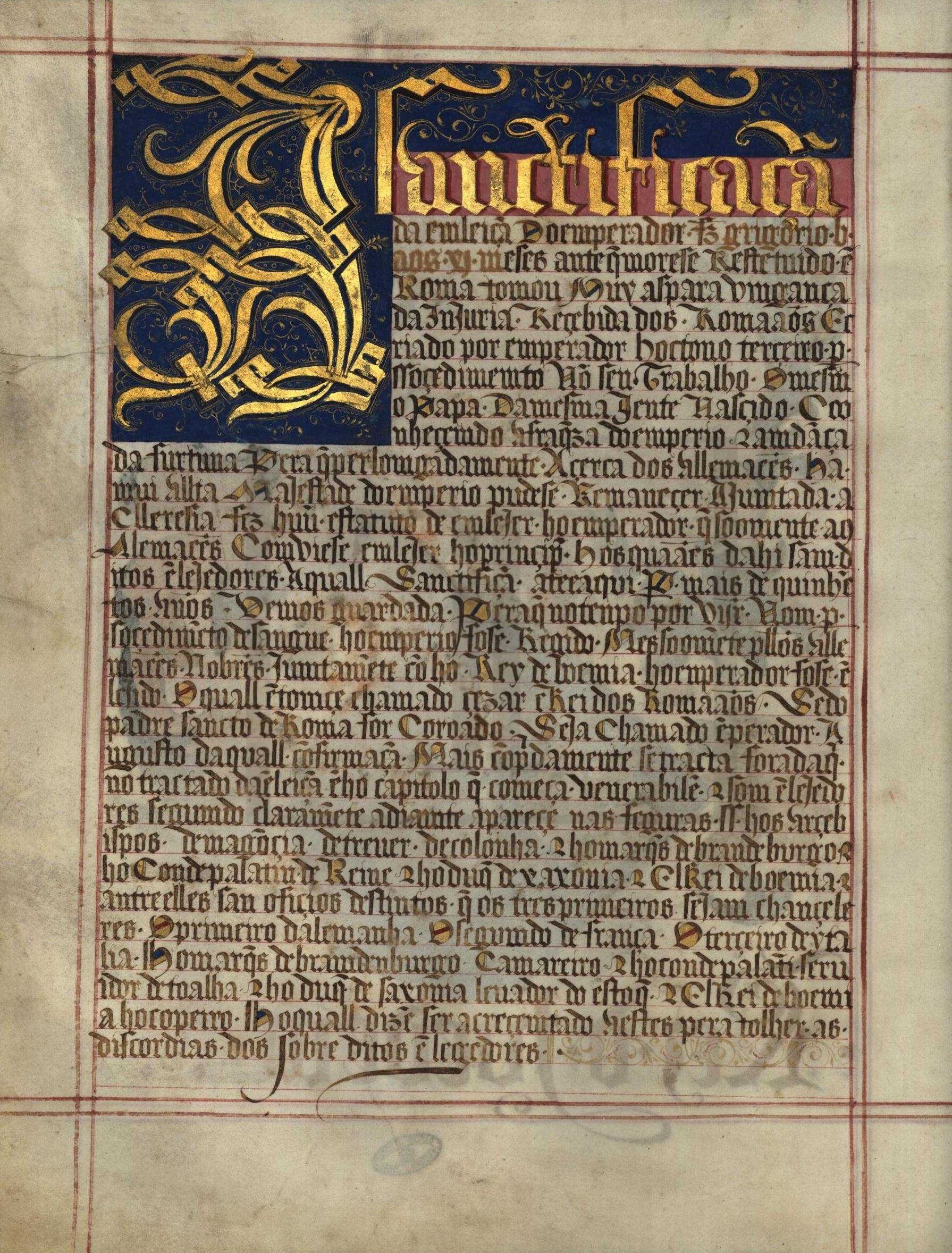 Livro do Armeiro-Mor, Sanctificação da Eleição do Imperador (fl 30v) Inicío do capítulo sobre a eleição do Imperador da Alemanha